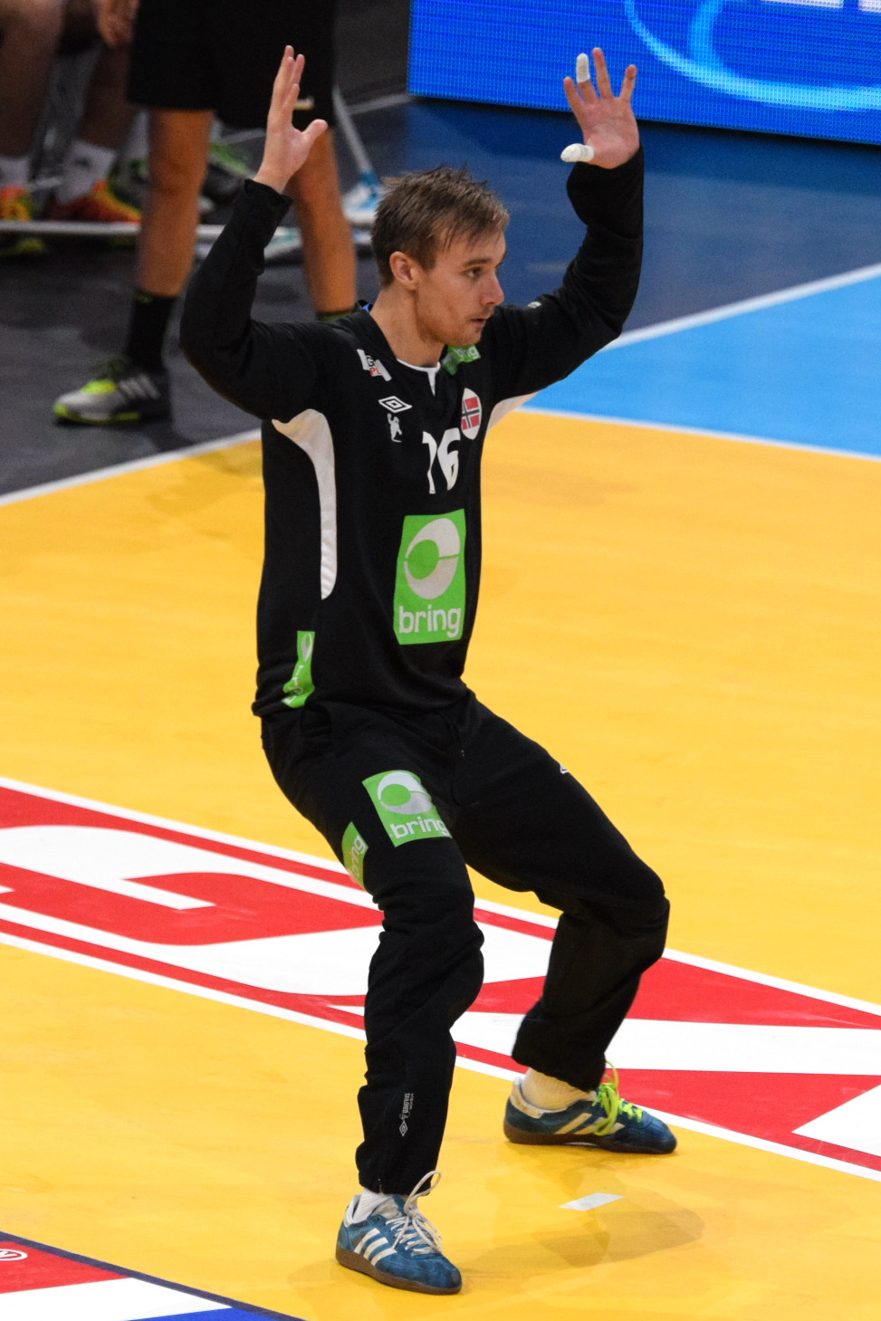 Espen Christensen , le 10 janvier 2016 lors du match Norège / Qatar durant la Golden League à l'AccordHotel Arena (Paris).